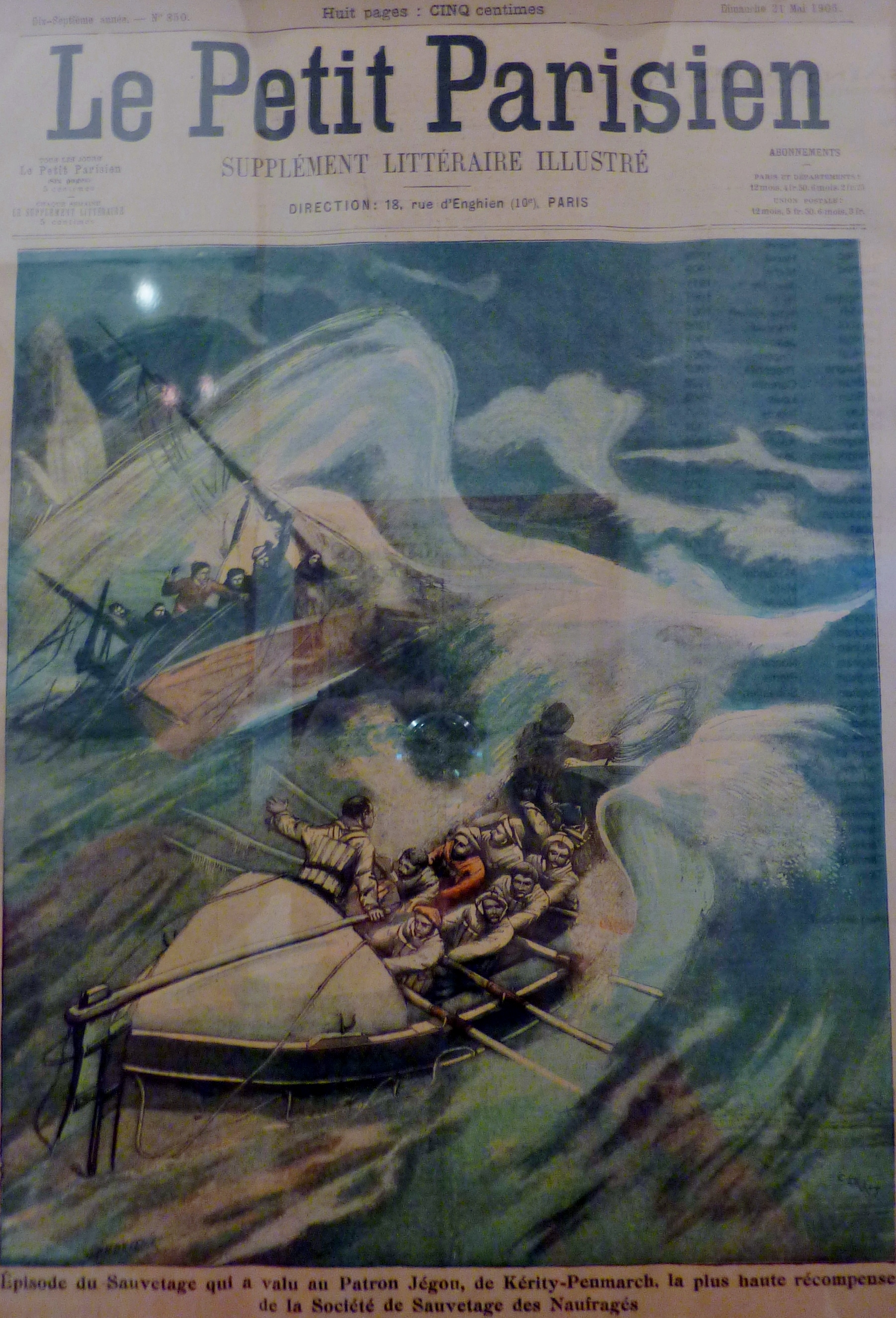 Penmarch : Gravure du supplément littéraire du journal Le Petit Parisien du 21 mai 1905 illustrant un sauvetage en mer par le patron Jegou, commandant le bateau de sauvetage de Kérity à l'occasion de sa décoration par la Société centrale de sauvetage des naufragés.